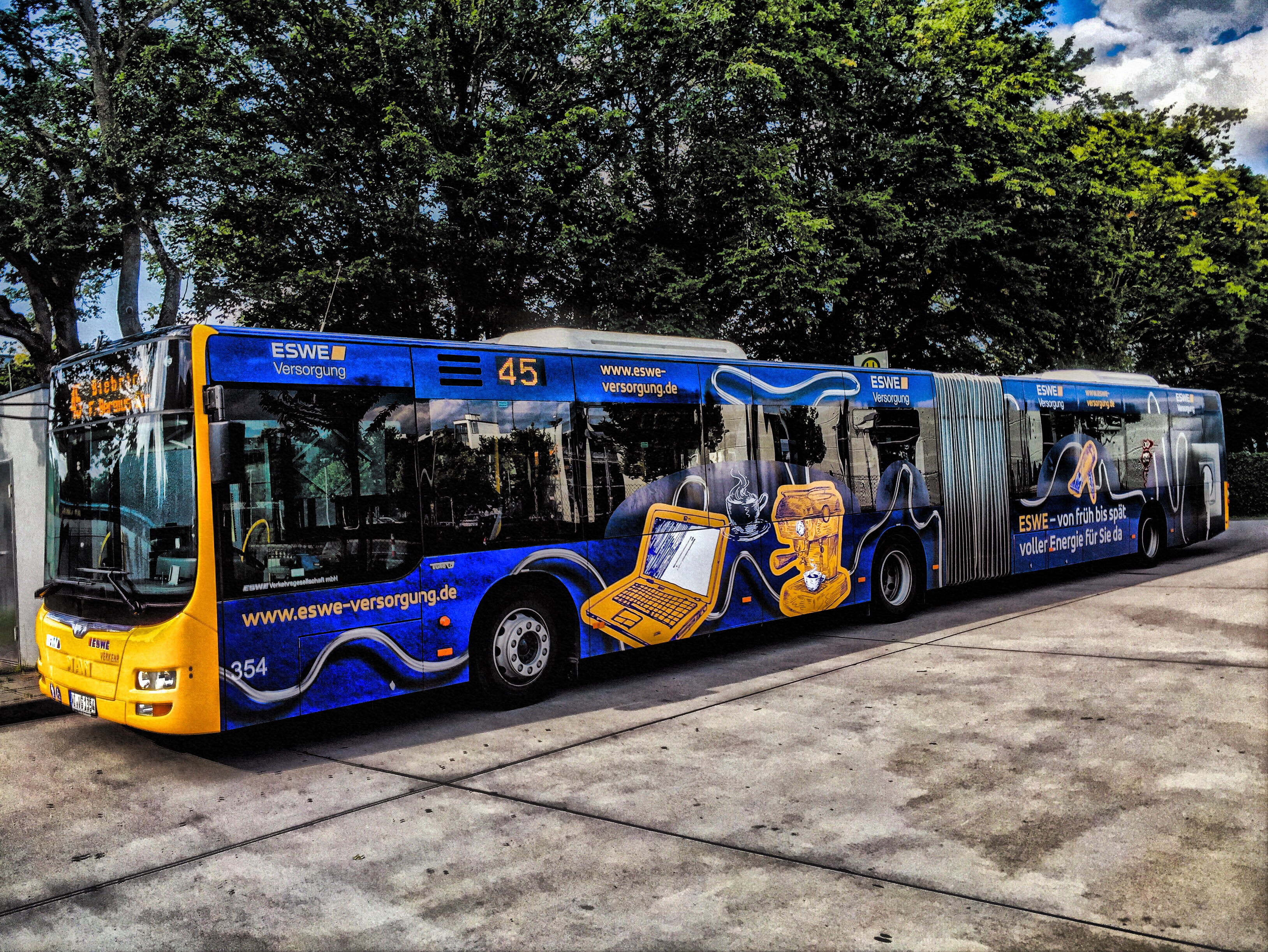 MAN Lion´s City A23 ESWE Verkehr Wagen 354 Bj. 2016 mit Vollwerbung der ESWE Versorgung, Warteposition Linie 45 Wiesbaden Raiffeisenplatz